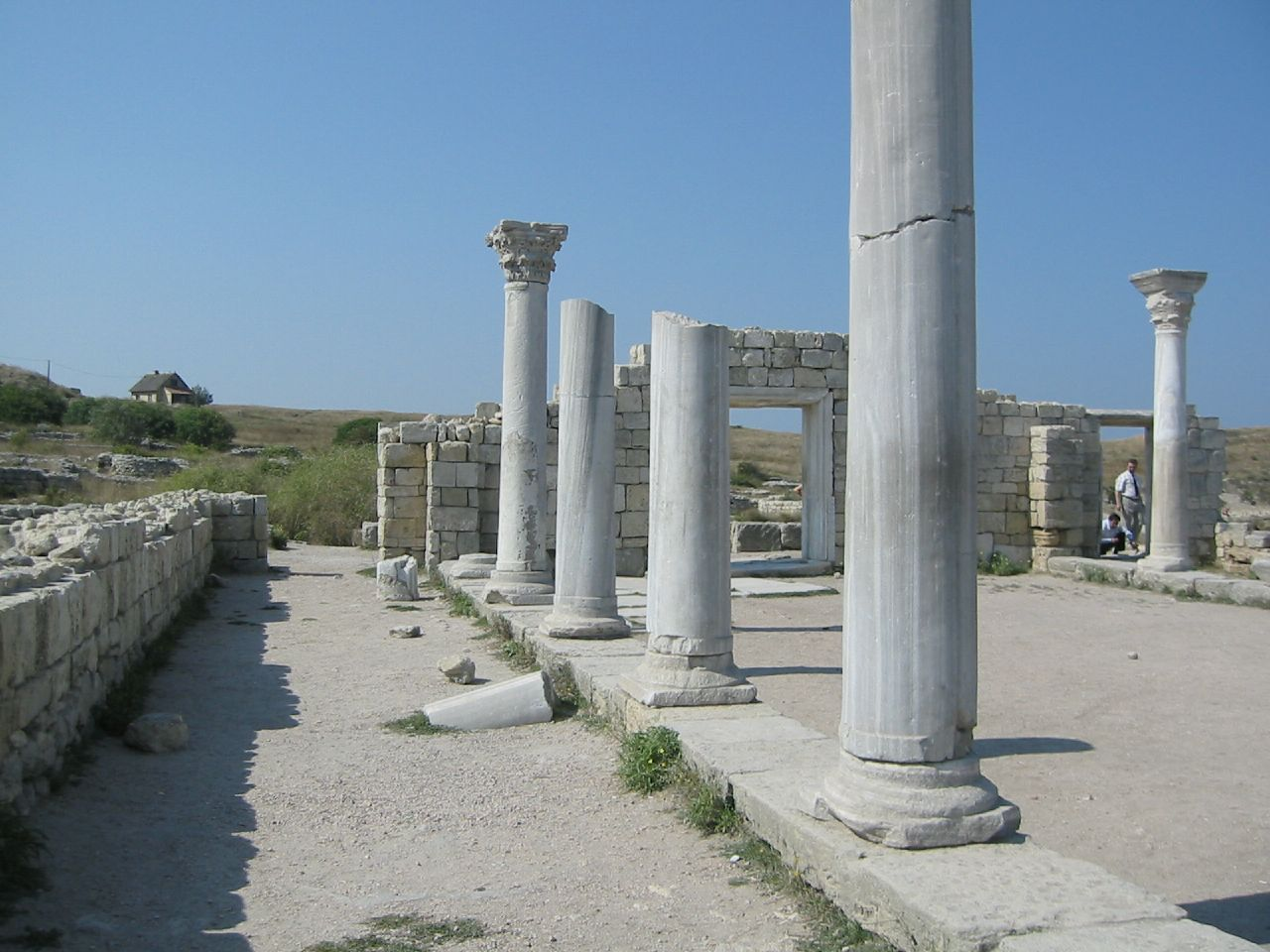 Restos de la antigua ciudad griega de Quersoneso en Táurica (actual Crimea)An ancient Greek colony Chersonesos (2005-08-071)